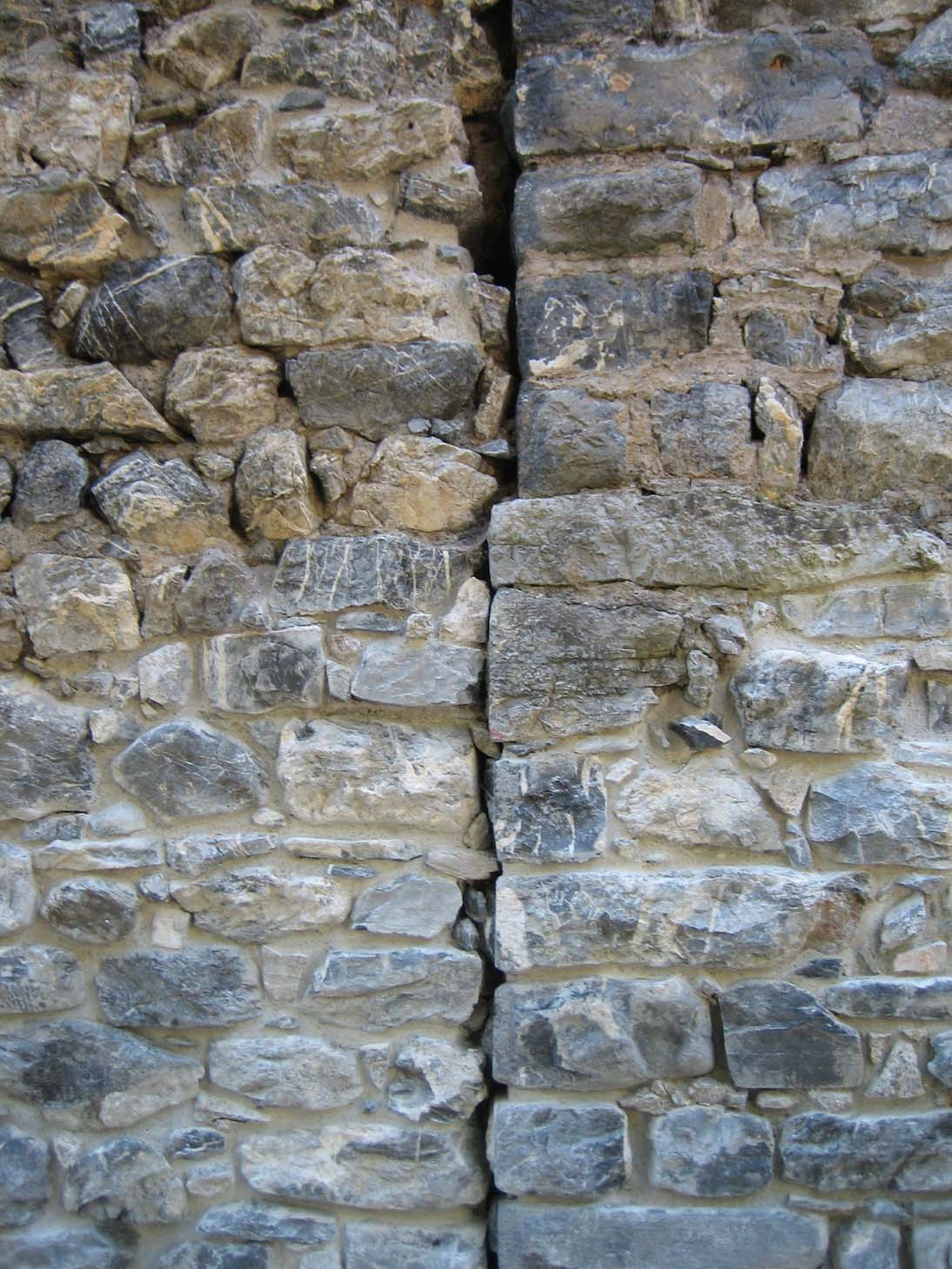 Stossfuge zwischen den Türmen